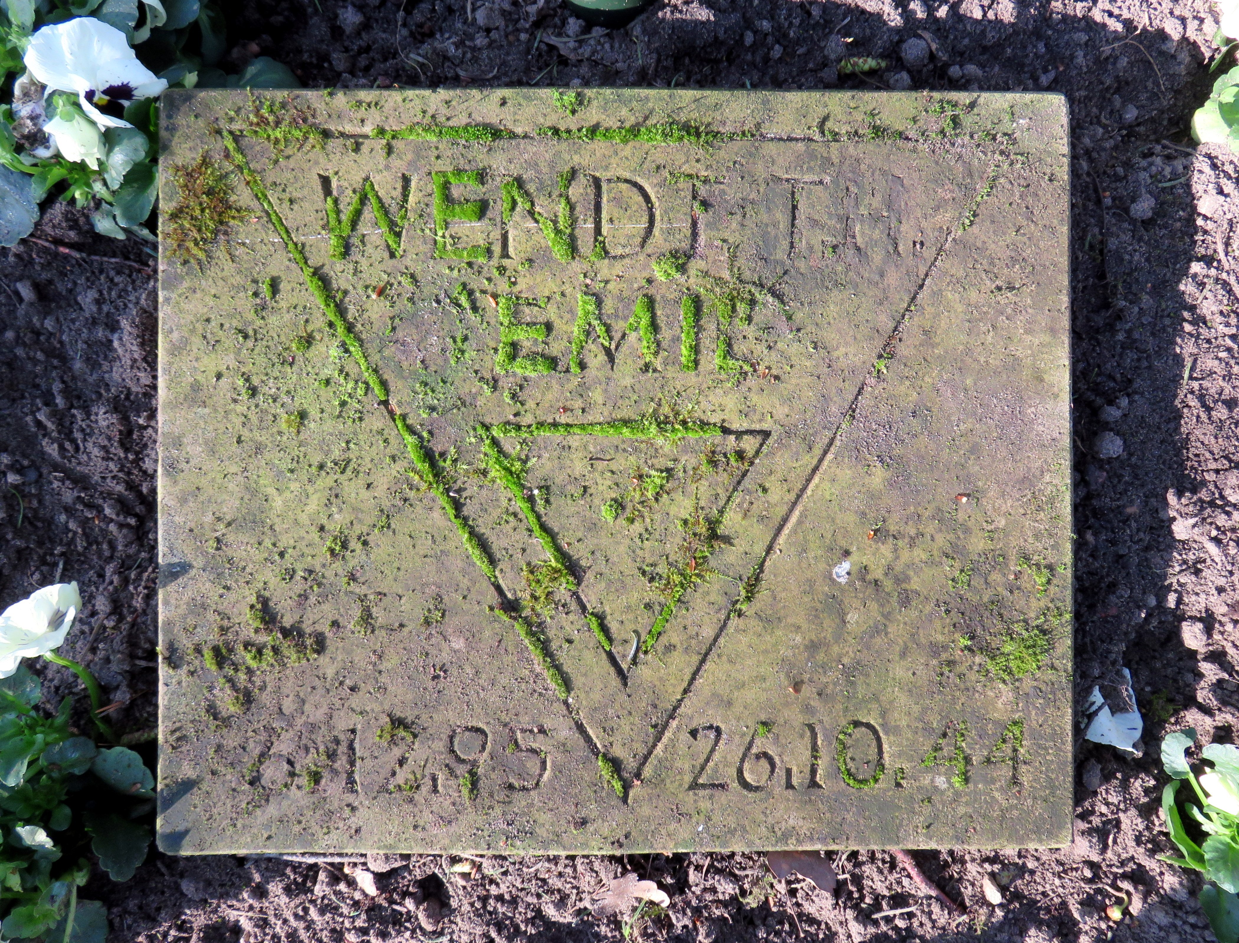 Kissenstein für den deutschen Widerstandskämpfer Emil Wendt im Ehrenhain Hamburgischer Widerstandskämpfer, Friedhof Ohlsdorf, Planquadrat K 5 (Bergstraße gegenüber dem Museum).